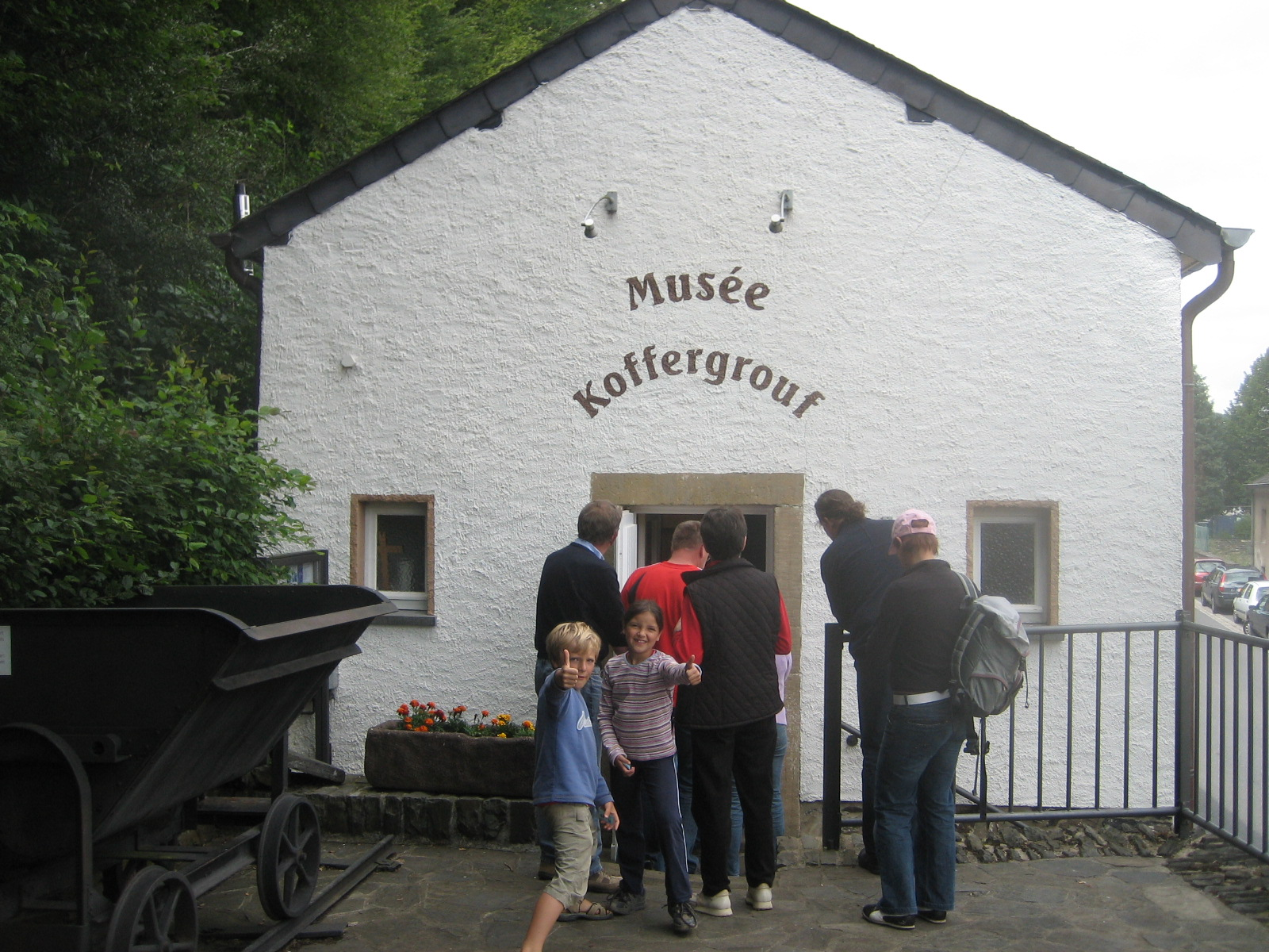 Sujet: De Musée Koffergrouf zu Stolzebuerg Auteur: Zinneke Lizenz: GNU-FDL